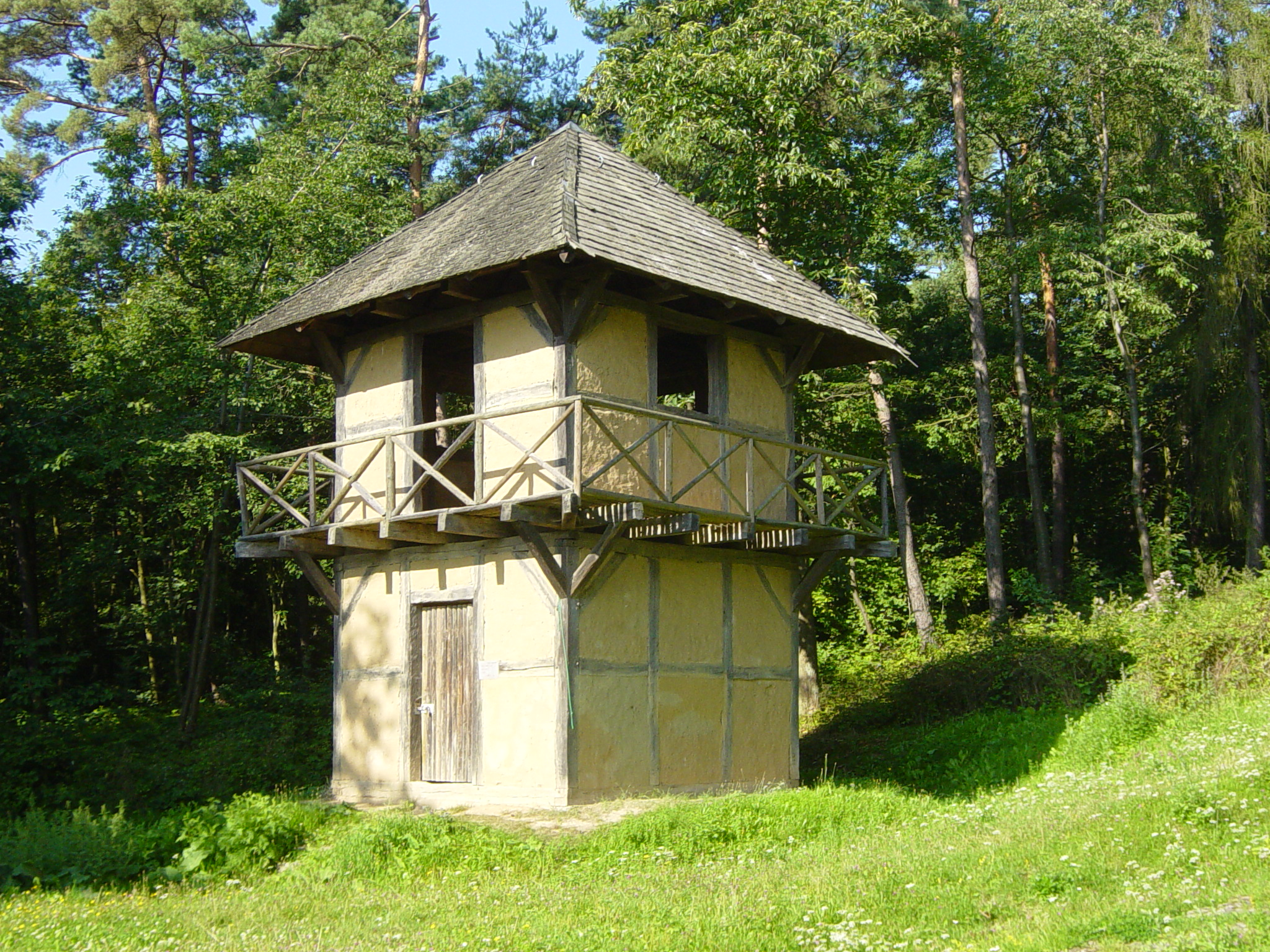 Turmstelle Wp 4/33, WTK-71 (p.321)